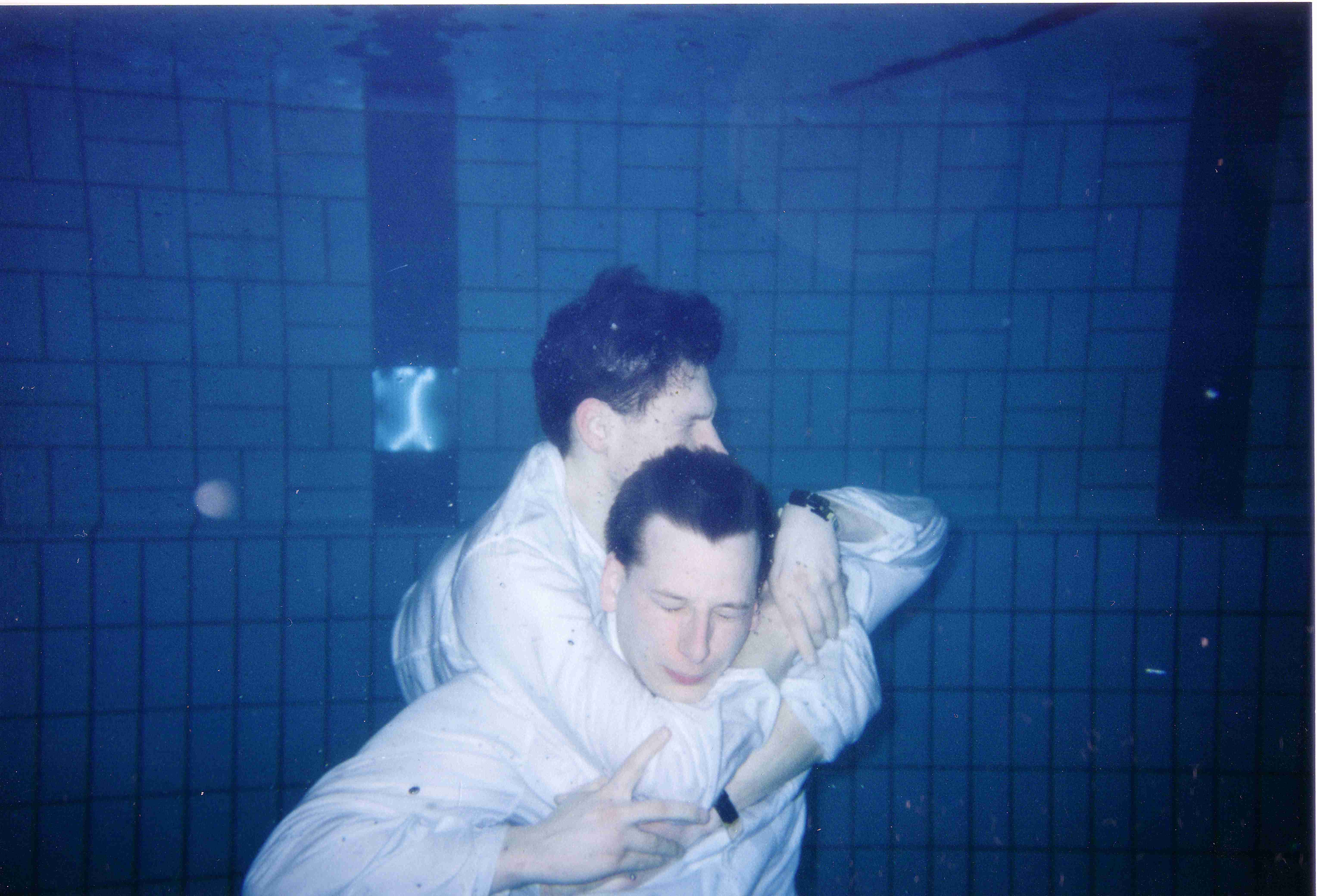 Befreiungsgriffe im Rettungsschwimmen / Lifeguard-Training